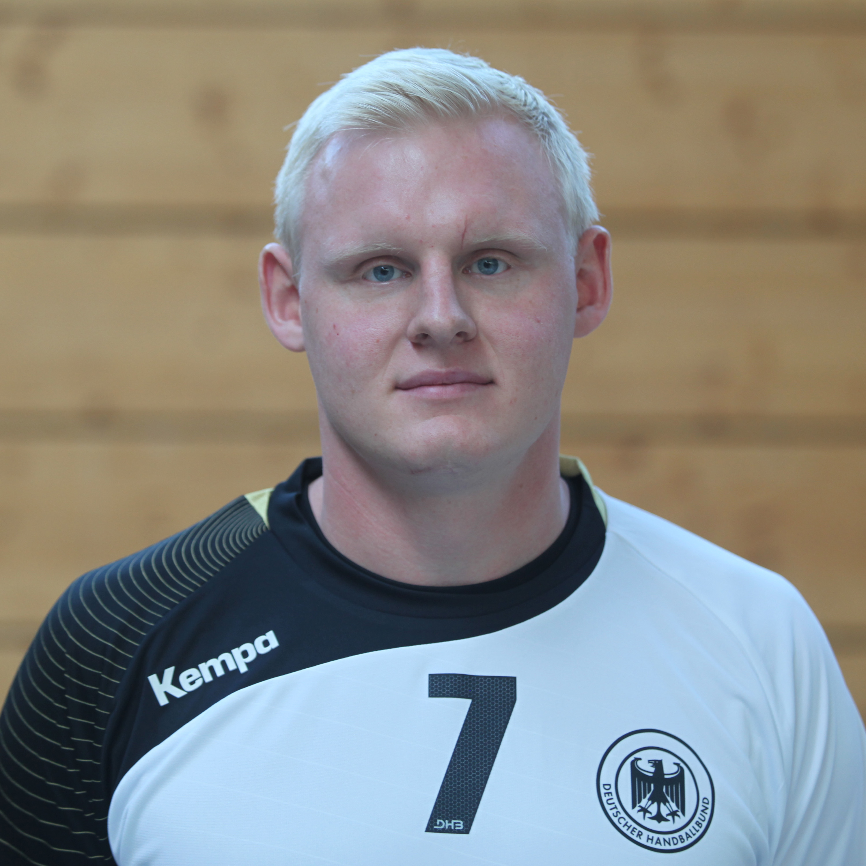 Patrick Wiencek, im Trikot der Deutschen Handball-Nationalmannschaft am 16. September 2014, in Heilbronn.